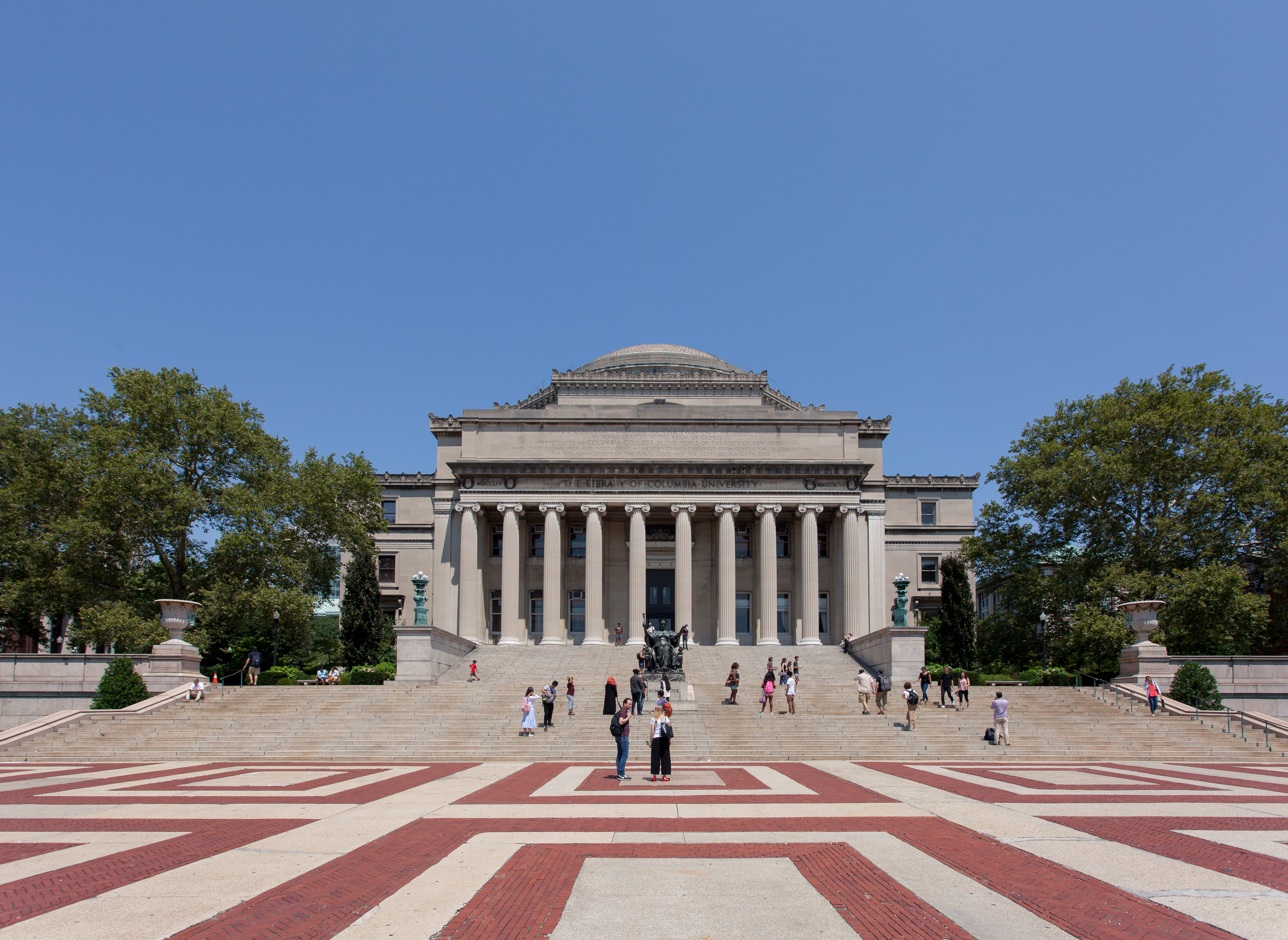 Low Memorial Library an der Columbia University